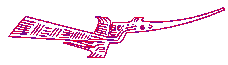 Phác thảo hoạ tiết chim trên mặt trống đồng Hoàng Hạ. (Tham khảo nguồn [1])